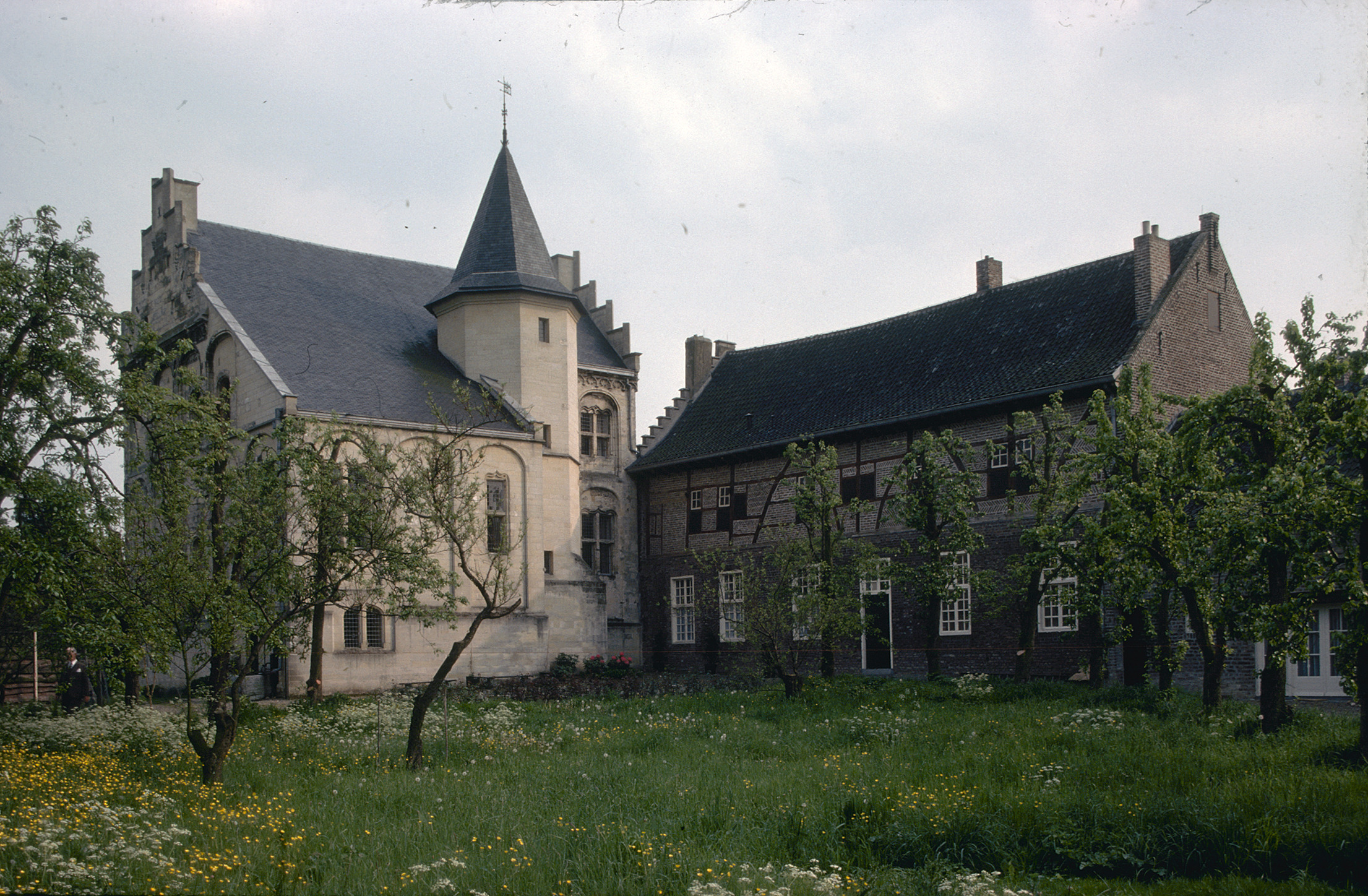 Kasteel Hasselholt (Het Goedje): Exterieur OVERZICHT